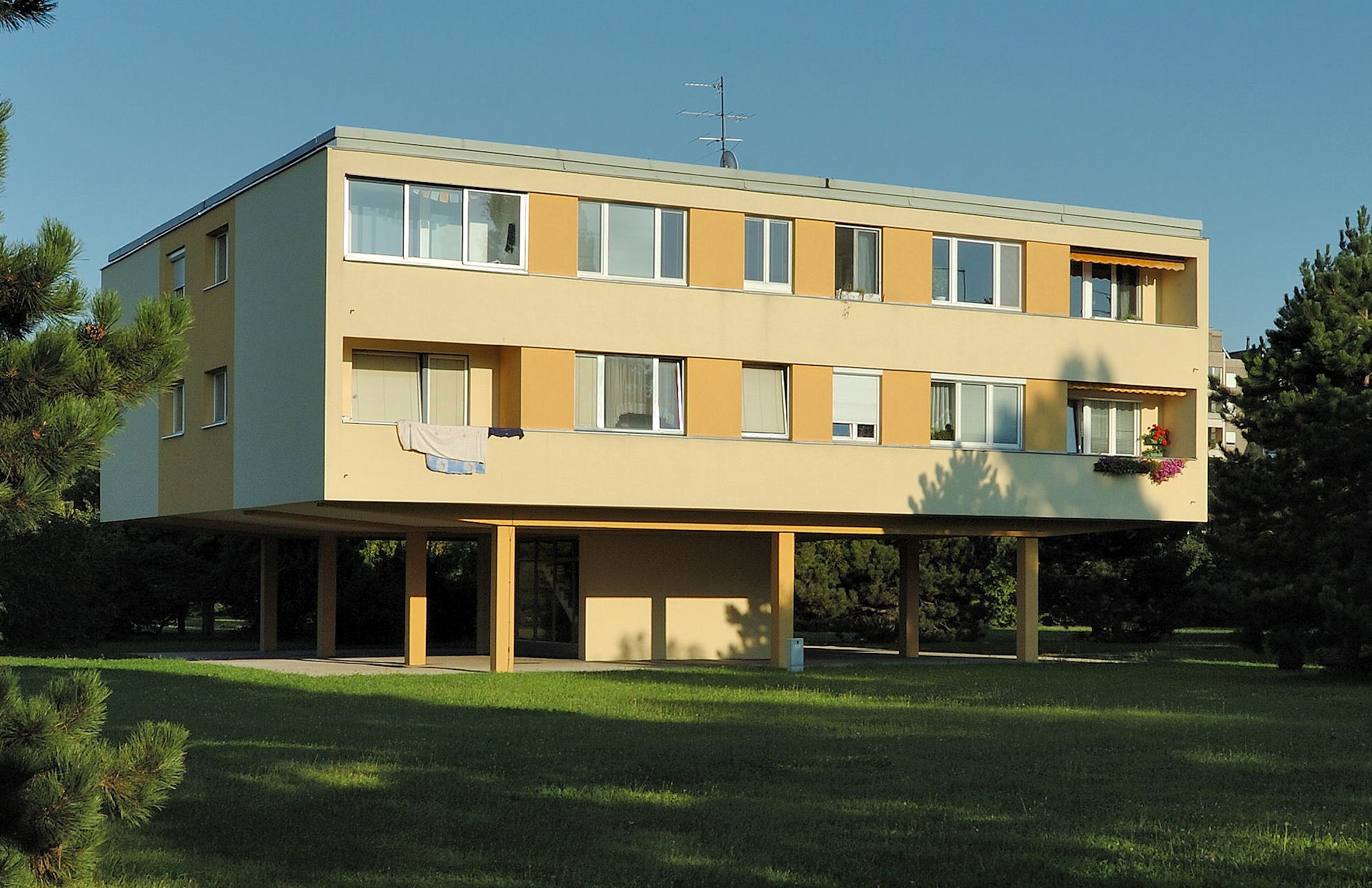 Maria Enzersdorf Südstadt, Stelzenhaus (zweistöckig) Dobrastraße